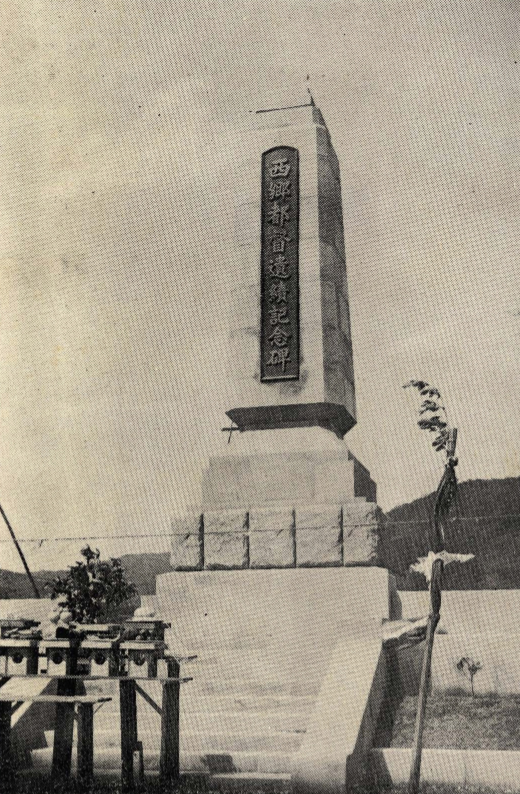 西鄉都督遺績記念碑於1936年設立於屏東恆春半島的石門古戰場